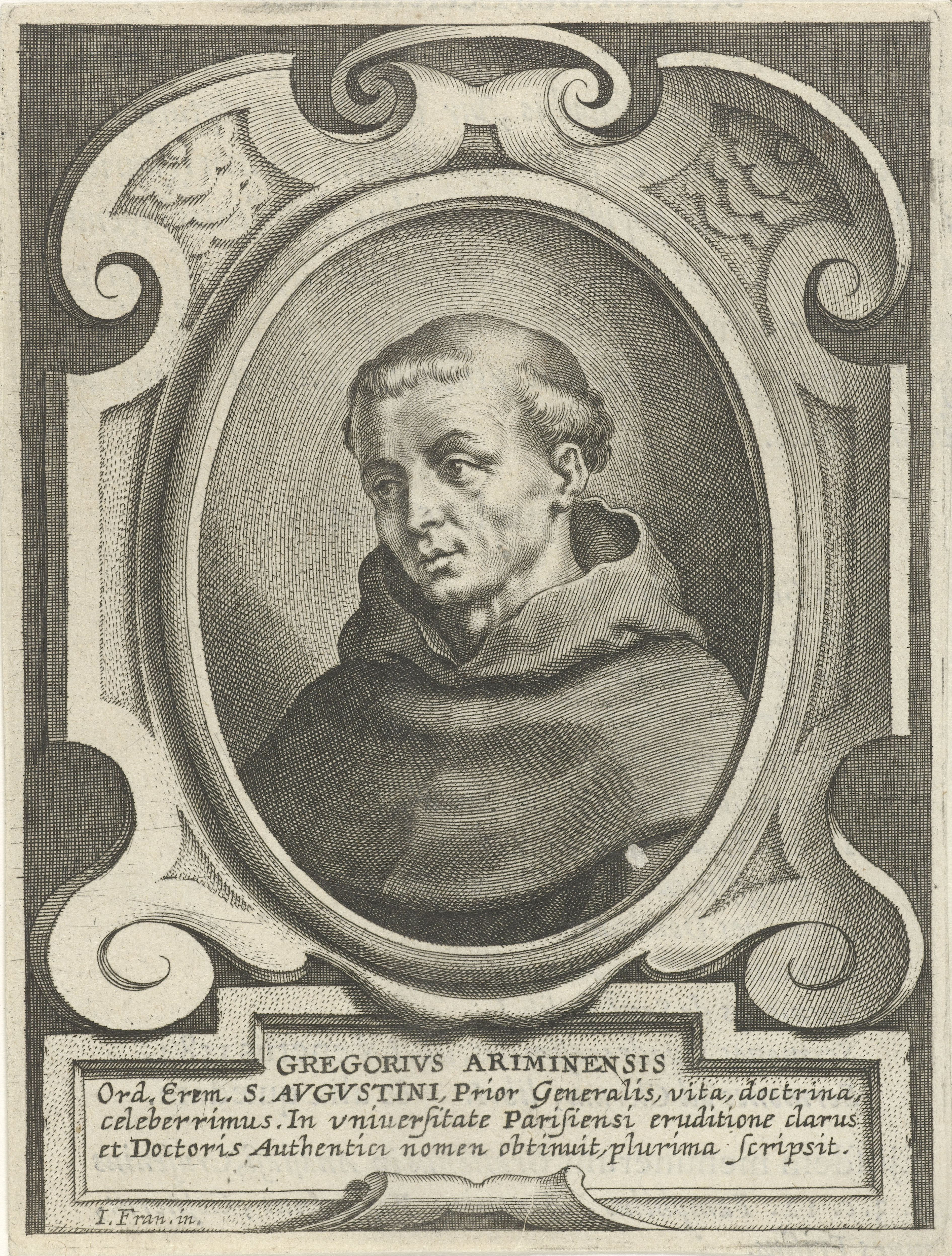 IdentificatieTitel(s): Portret van de Augustijn Gregorius AriminensisObjecttype: prent boekillustratie Objectnummer: RP-P-1910-4307Catalogusreferentie: Hollstein Dutch 345-374Opschriften / Merken: verzamelaarsmerk, verso, gestempeld: Lugt 2228VervaardigingVervaardiger: prentmaker: Cornelis Galle (I)naar ontwerp van: Jacques Franckaert (II) (vermeld op object)Plaats vervaardiging: Zuidelijke NederlandenDatering: 1636Fysieke kenmerken: gravureMateriaal: papier Techniek: graveren (drukprocedé)Afmetingen: plaatrand: h 135 mm × b 105 mmToelichtingBoekillustratie voor: C. Curtius, Virorum illustrium ex ordine Eremitarum D. Augustini elogia , Antwerpen: J. Cnobbaert, 1636.OnderwerpWat: monastic orders, monastic life ~ Roman Catholic churchVerwerving en rechtenVerwerving: aankoop 1905Copyright: Publiek domein